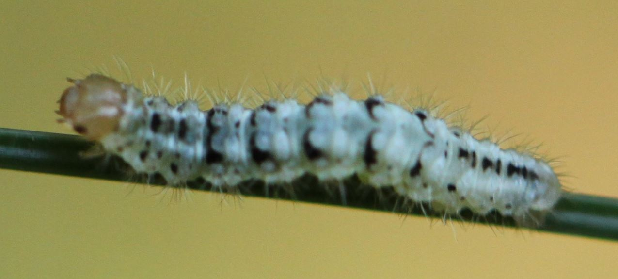 Jungraupe des Wolfsmilchspanner (auch Mausspanner) (Minoa murinata) am 8.9.2016 in der Schwetzinger Hardt